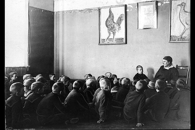 Lærer og forfatterinnen Regine Normann forteller eventyr for "sine gutter". Albumtittel: "Sofienberg skole femti år - første september 1933."